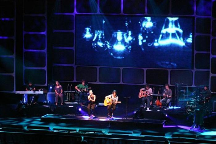 Show da dupla Sandy e Junior, no Via Funchal em São Paulo